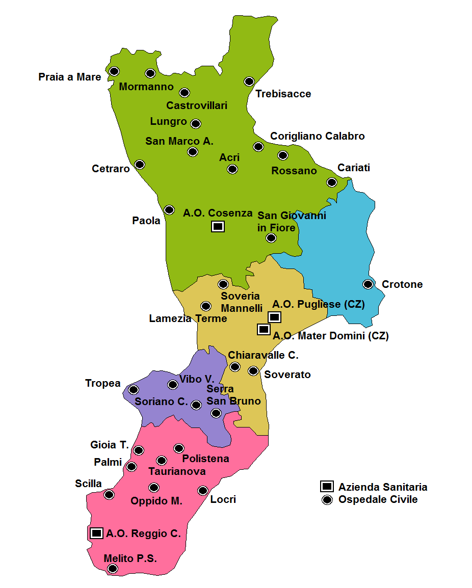 Mappa degli Ospedali della calabria al 2011. Alcuni ospedali evidenziati saranno soggetti a chiusra a seguito di Realizzazione di piano di rientro della Regione